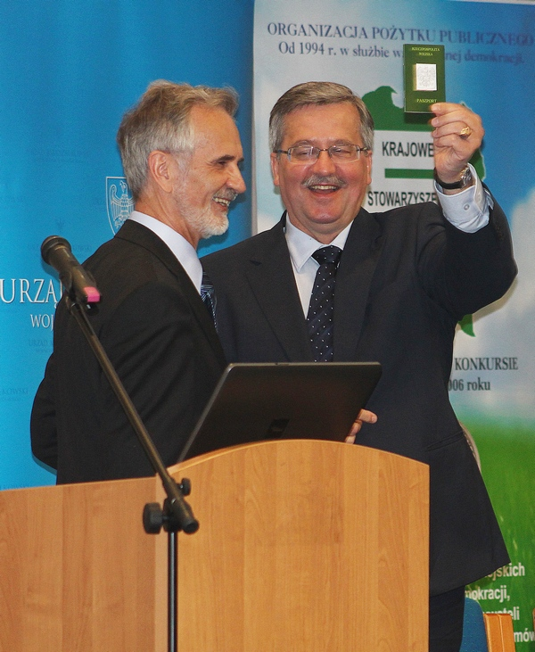 W trakcie konferencji ,,Wiejska Polska" w Licheniu B. Komorowski, prezydent dostał od I. Niewiarowskiego, prezesa KSS symboliczny paszport